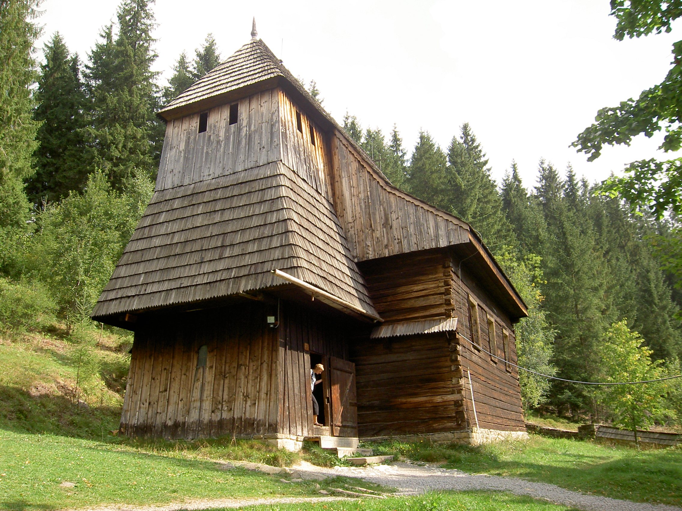 Muzeum oravské vesnice Zuberec - Brestová, kostel sv. Alžběty ze Zábreže z 15. století